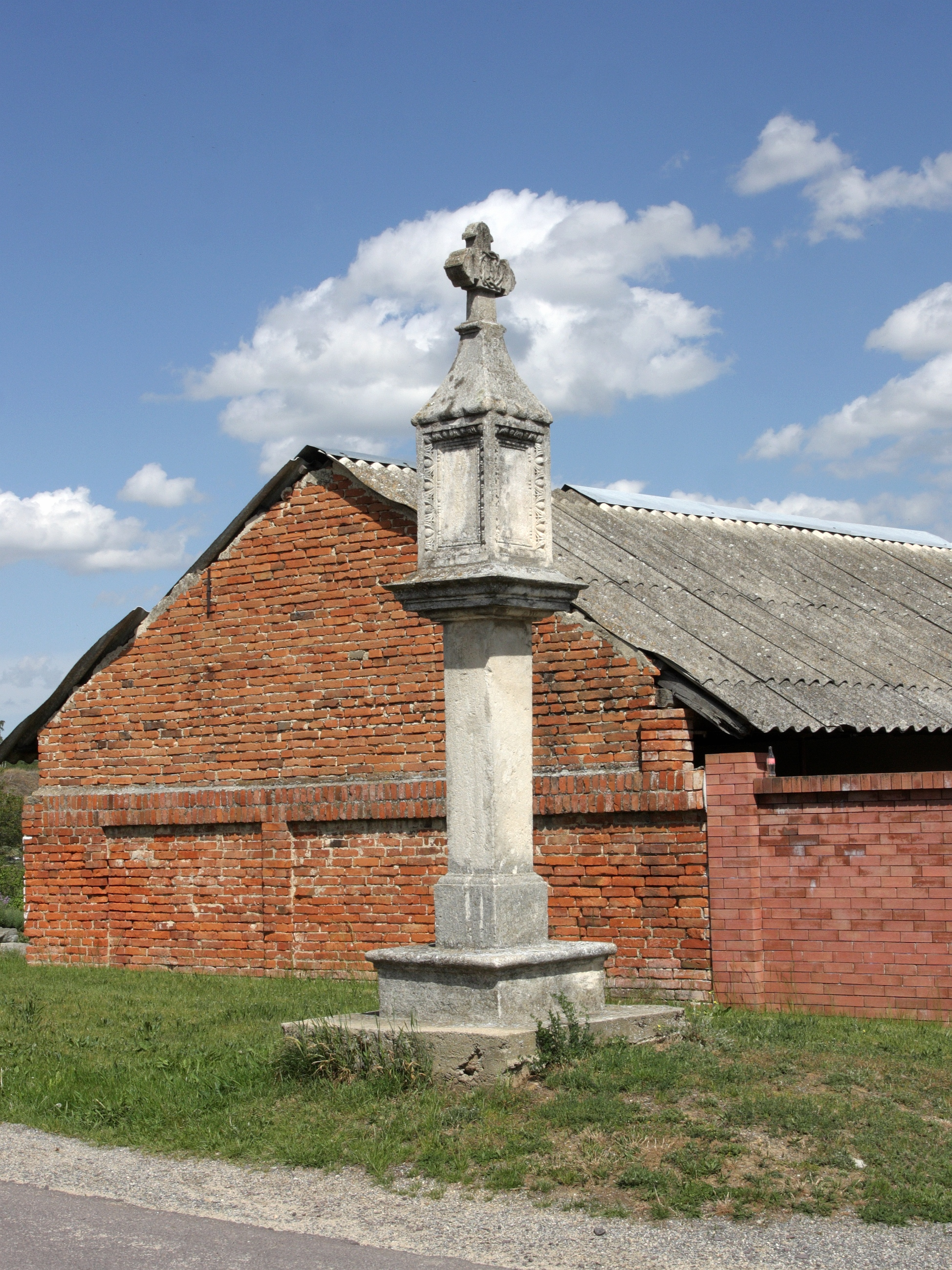 Popice (Znojmo) - boží muka naproti čp. 83.